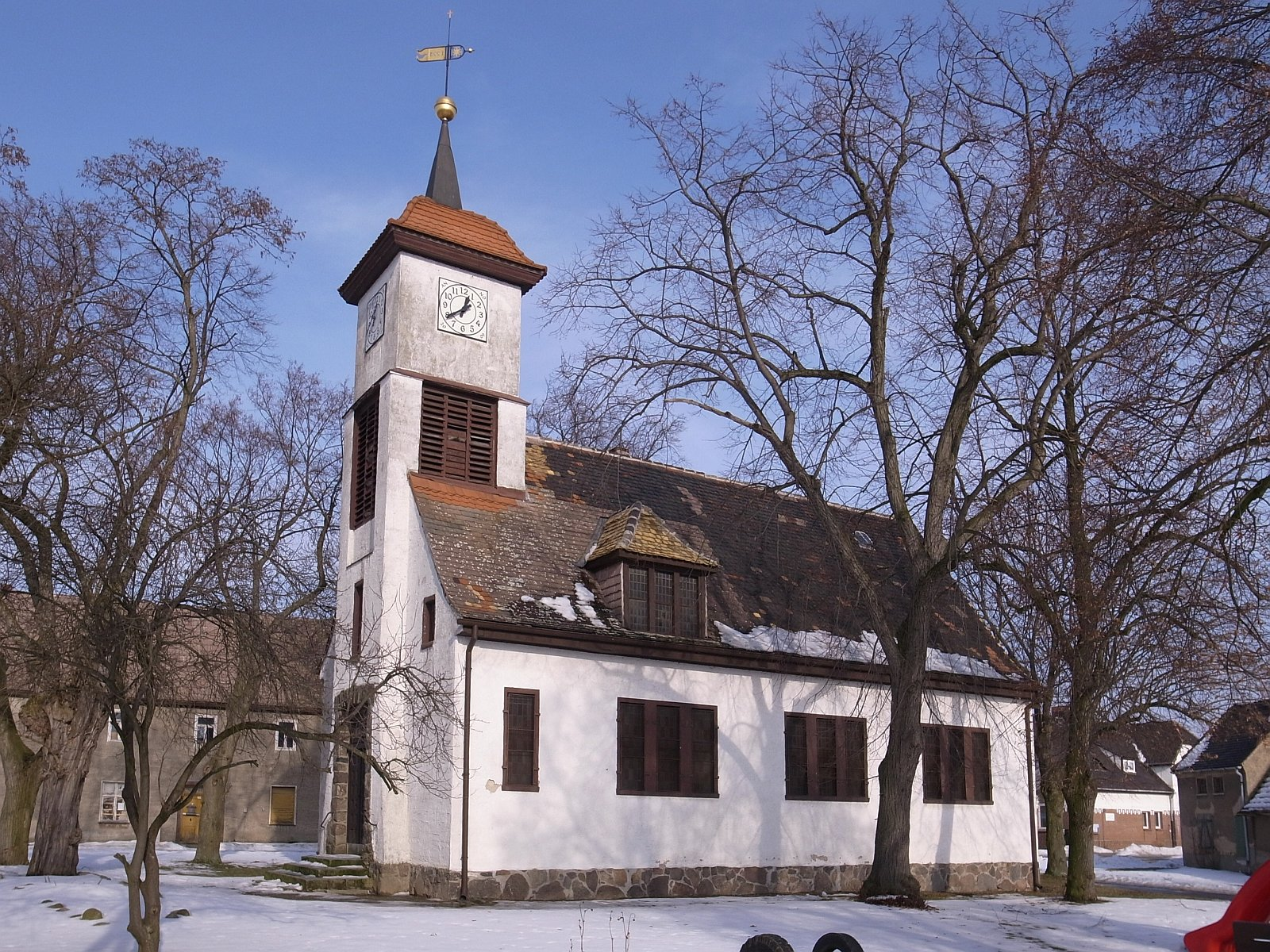 Tornau vor der Heide (Tornau v.d.Heide), Kirche